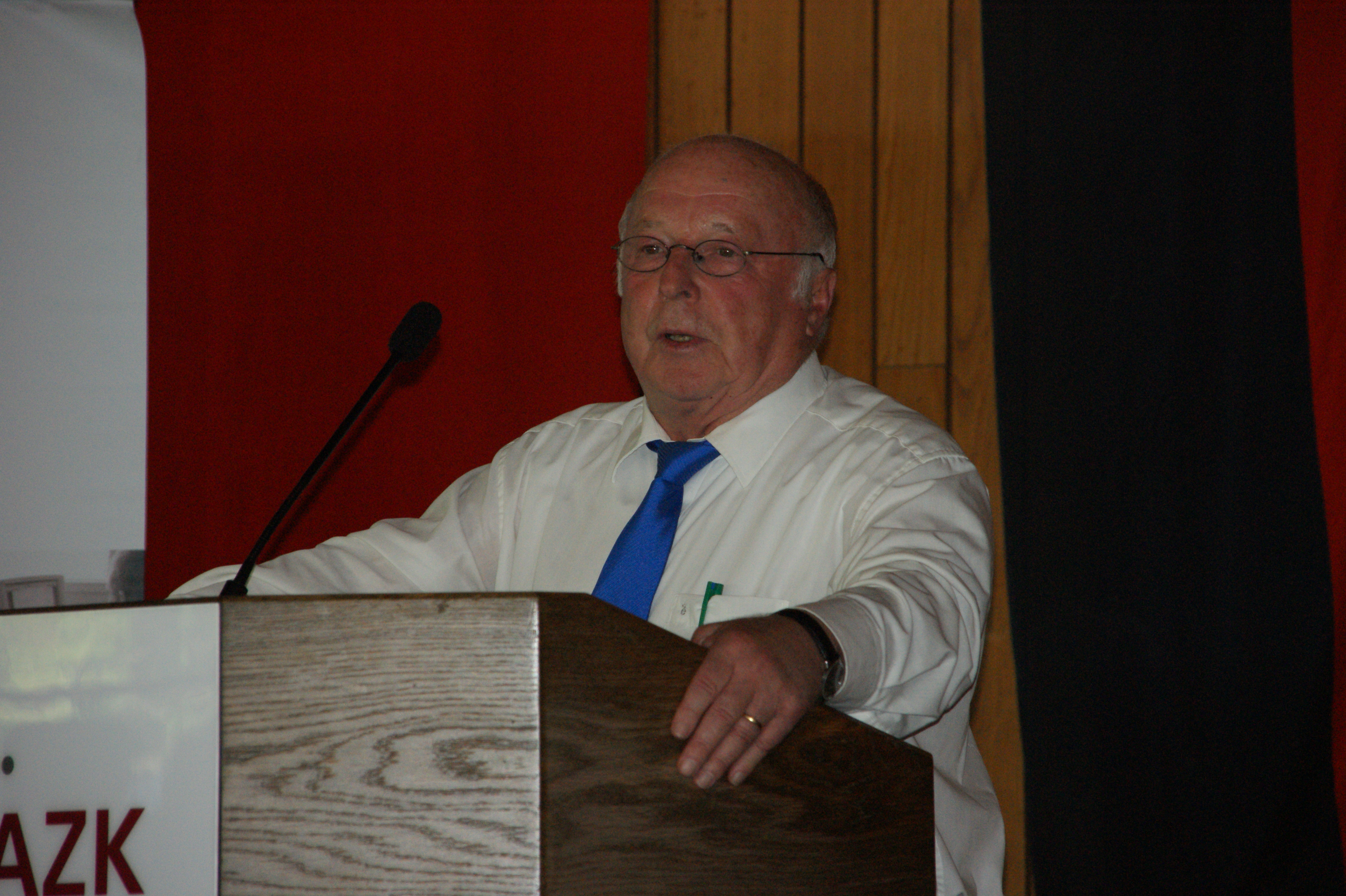 Norbert Blüm bei der Veranstaltung “25 Jahre AZK” in der Aula der CJD Christophorusschule Königswinter